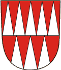 Znak obce Osoblaha